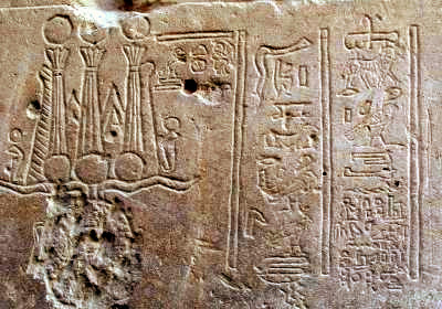 Description : Dernière inscription hiéroglyphique connue, porte d'Hadrien à Philæ (invocation au dieu Mandoulis) Source : S. Rosmorduc, 2004 (photographie personnelle) Statut : GFDL Référence bibliographique: DEVAUCHELLE, Didier, 24 août 394 - 24 août 1994. 1600 ans, Bulletin de la société française d'égyptologie 131 (1994), 16-18